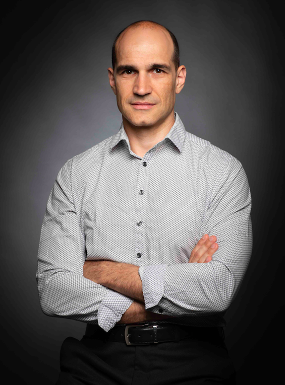 Eric Fourneret, philosophe